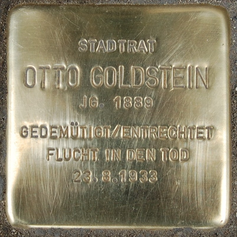 Stolperstein für Stadtrat Otto Goldstein (1889-1938), Rathausplatz 1 (vor dem Rathaustor), Bad Kissingen